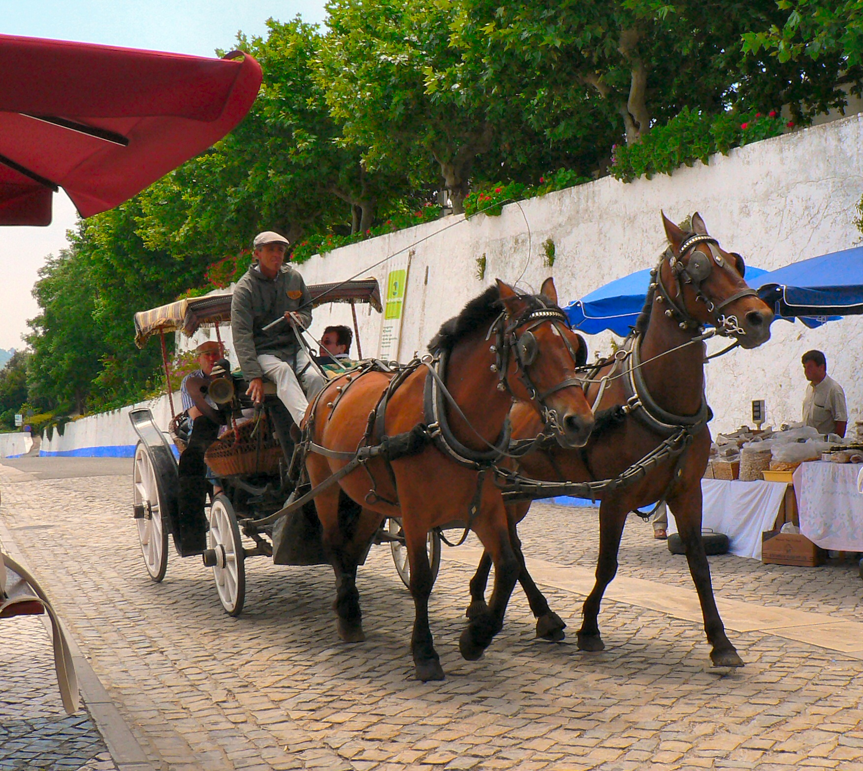 Charrete turística em Óbidos